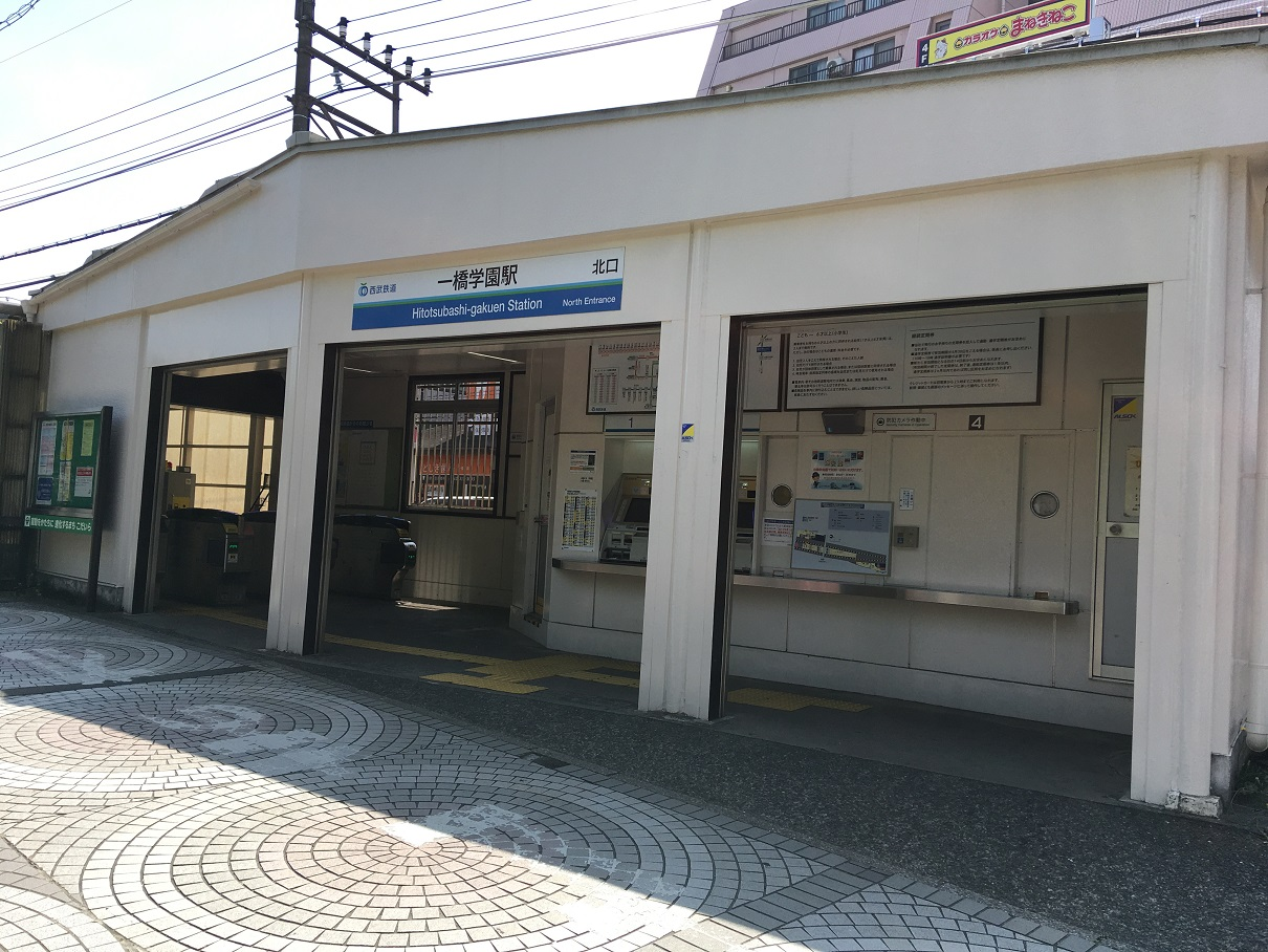 一橋学園駅北口